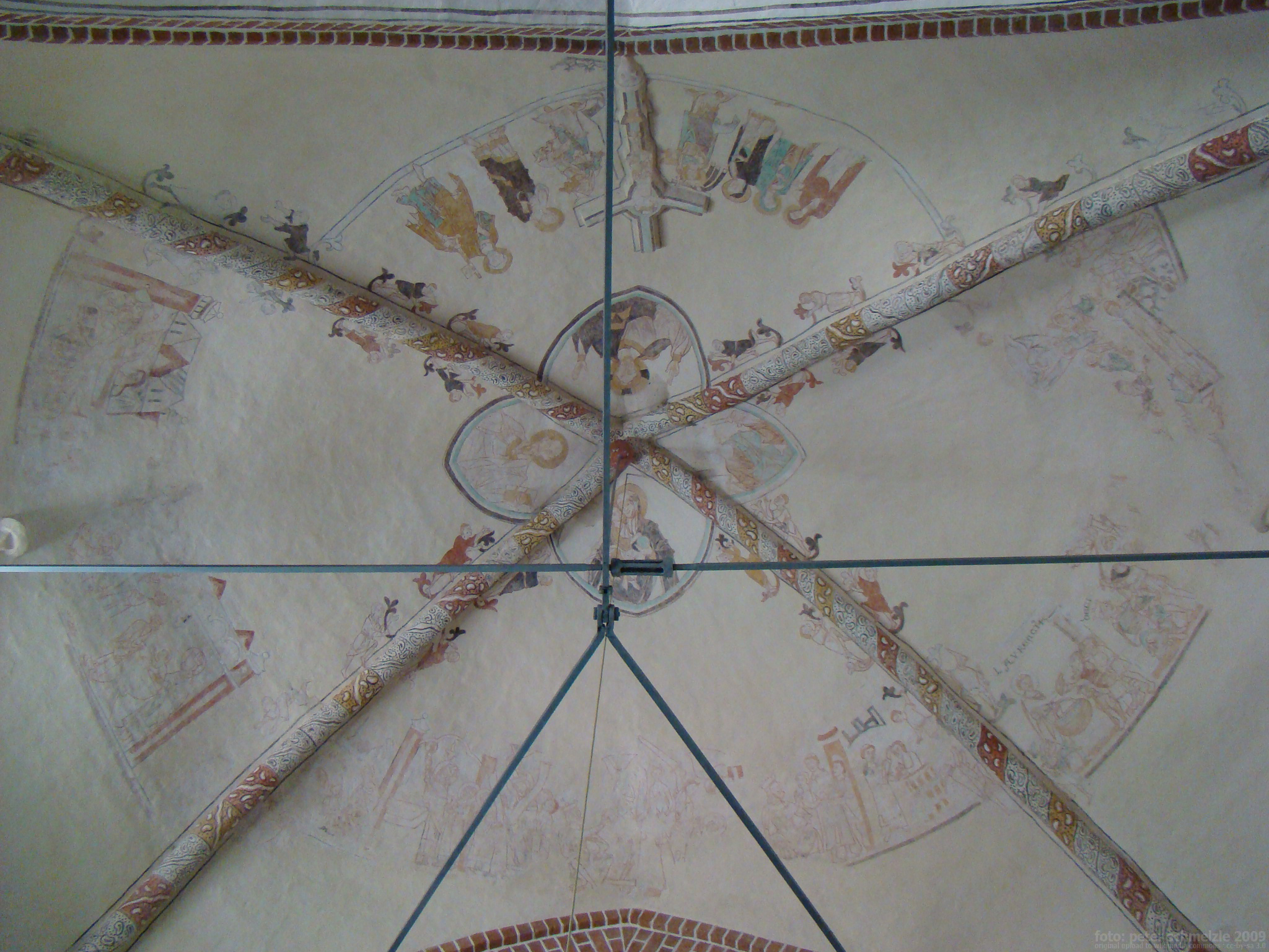 Dorfkirche Altkalen, Deckengemälde